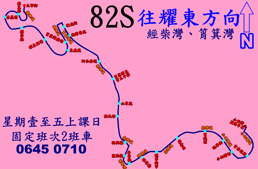 中文（香港）: 新巴82S線(往耀東方向)的走線圖